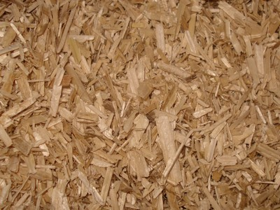 Copeaux